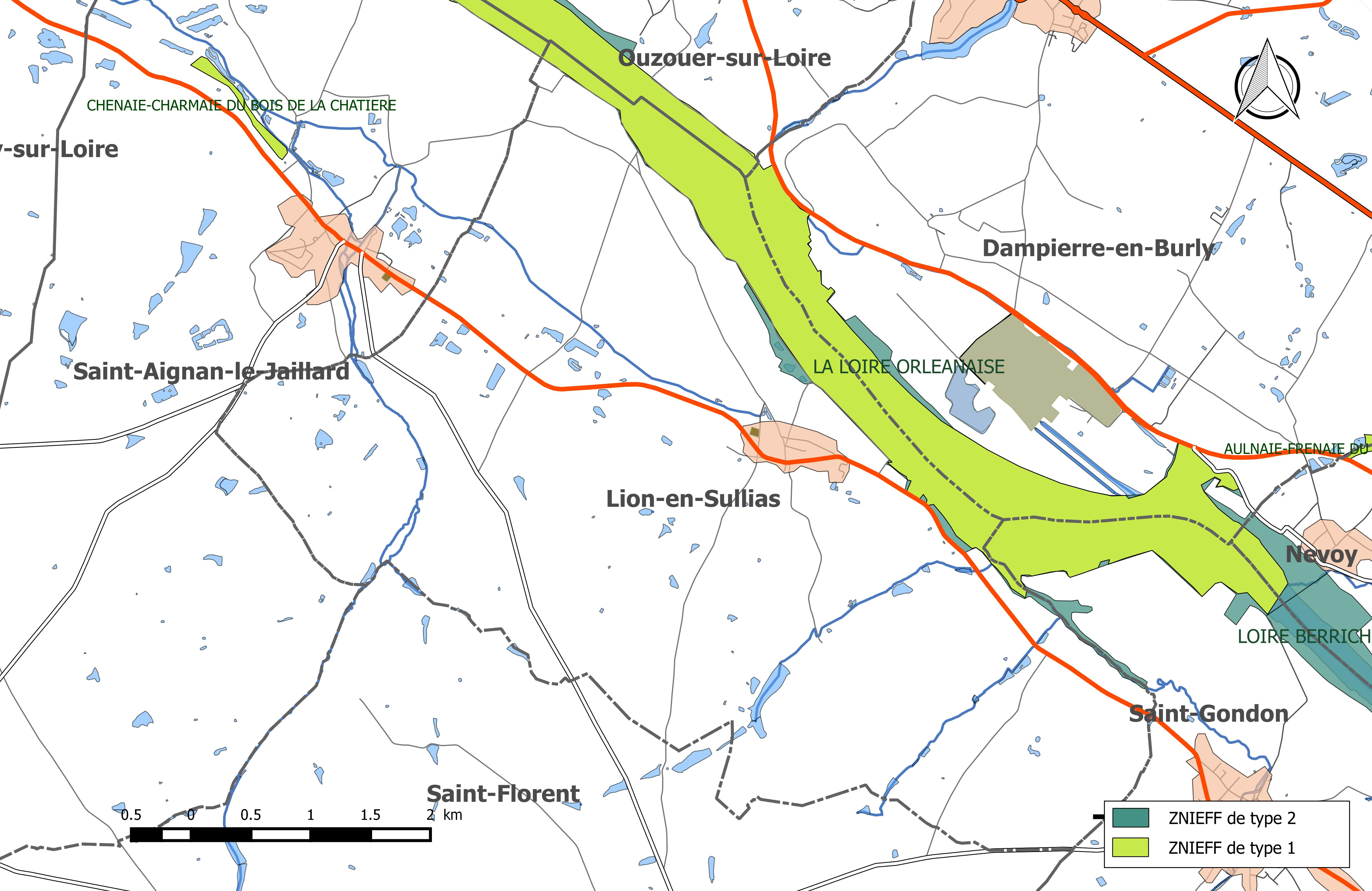 Carte des Zones naturelles d'intérêt écologique faunistique et Floristique (ZNIEFF) de la commune de Lion-en-Sullias.